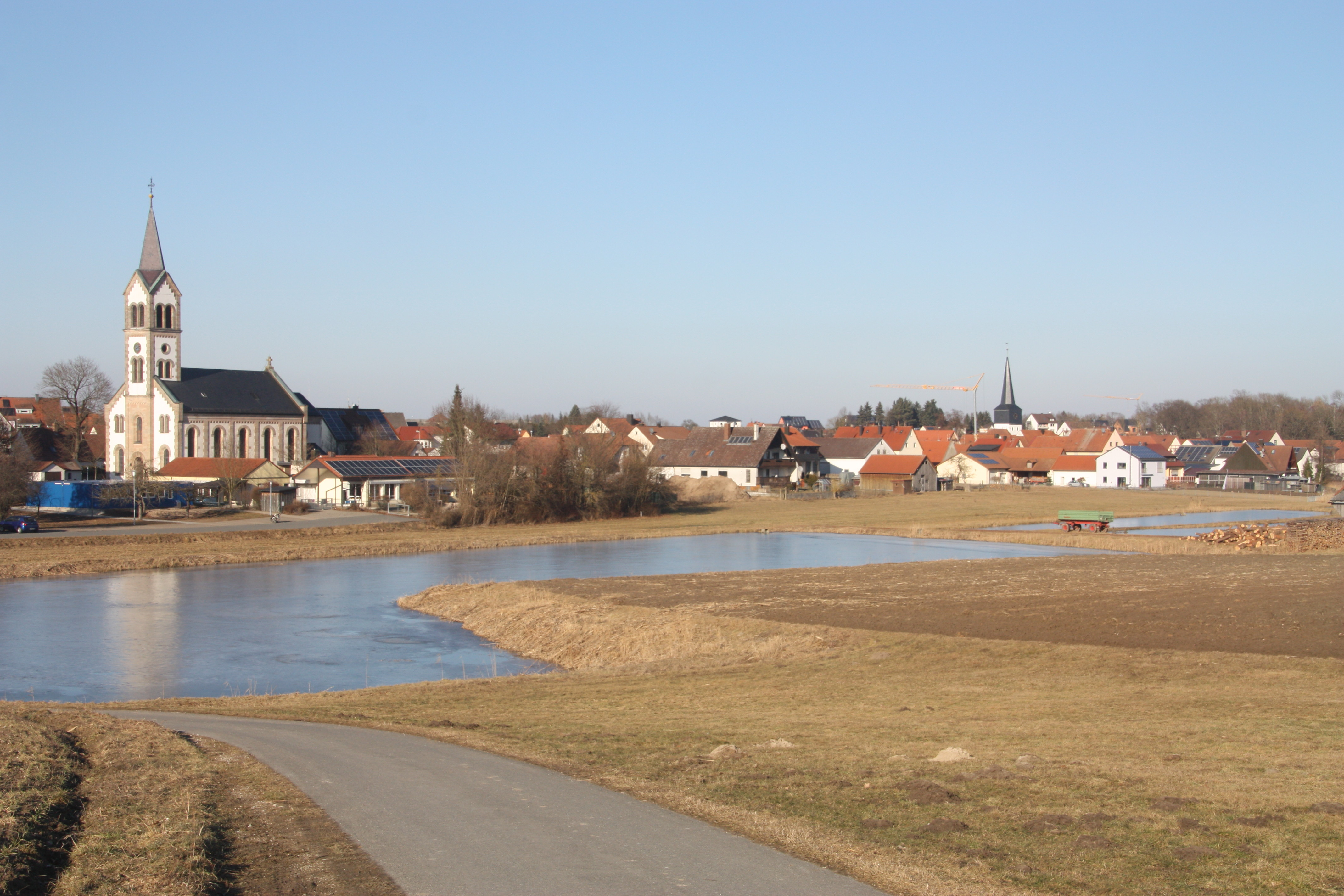 Weisendorf